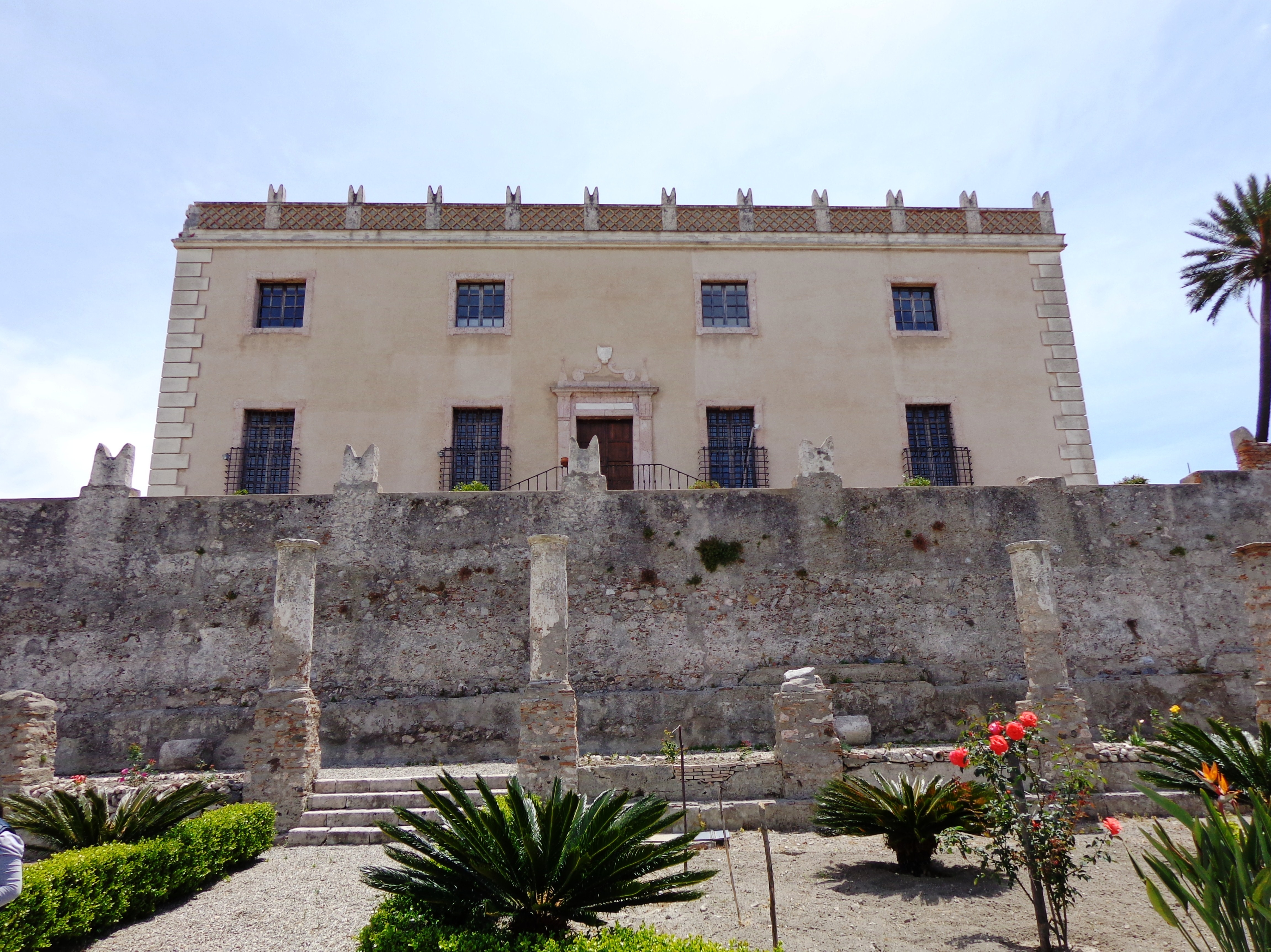 Castello di Bauso This is a photo of a monument which is part of cultural heritage of Italy.